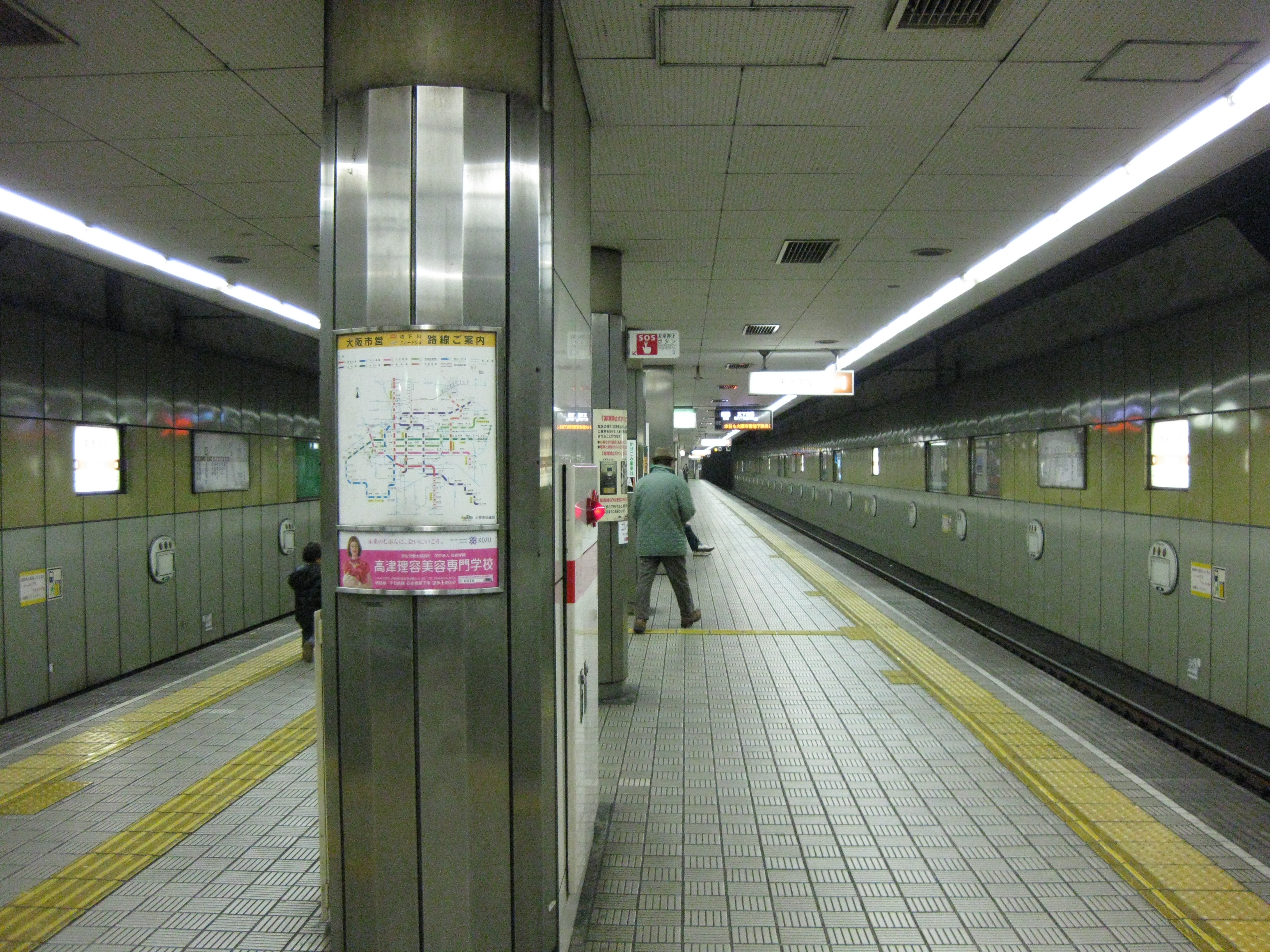 地下鉄恵美須町駅ホーム